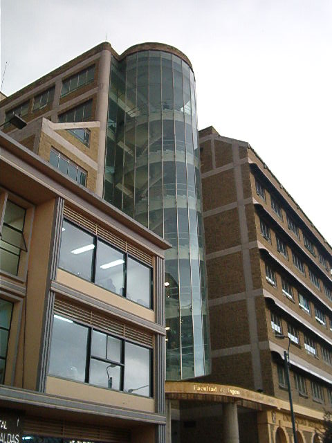 Sede "Sabio Caldas", Facultad Ingeniería de la Universidad Distrital Francisco José de Caldas, Bogotá DC